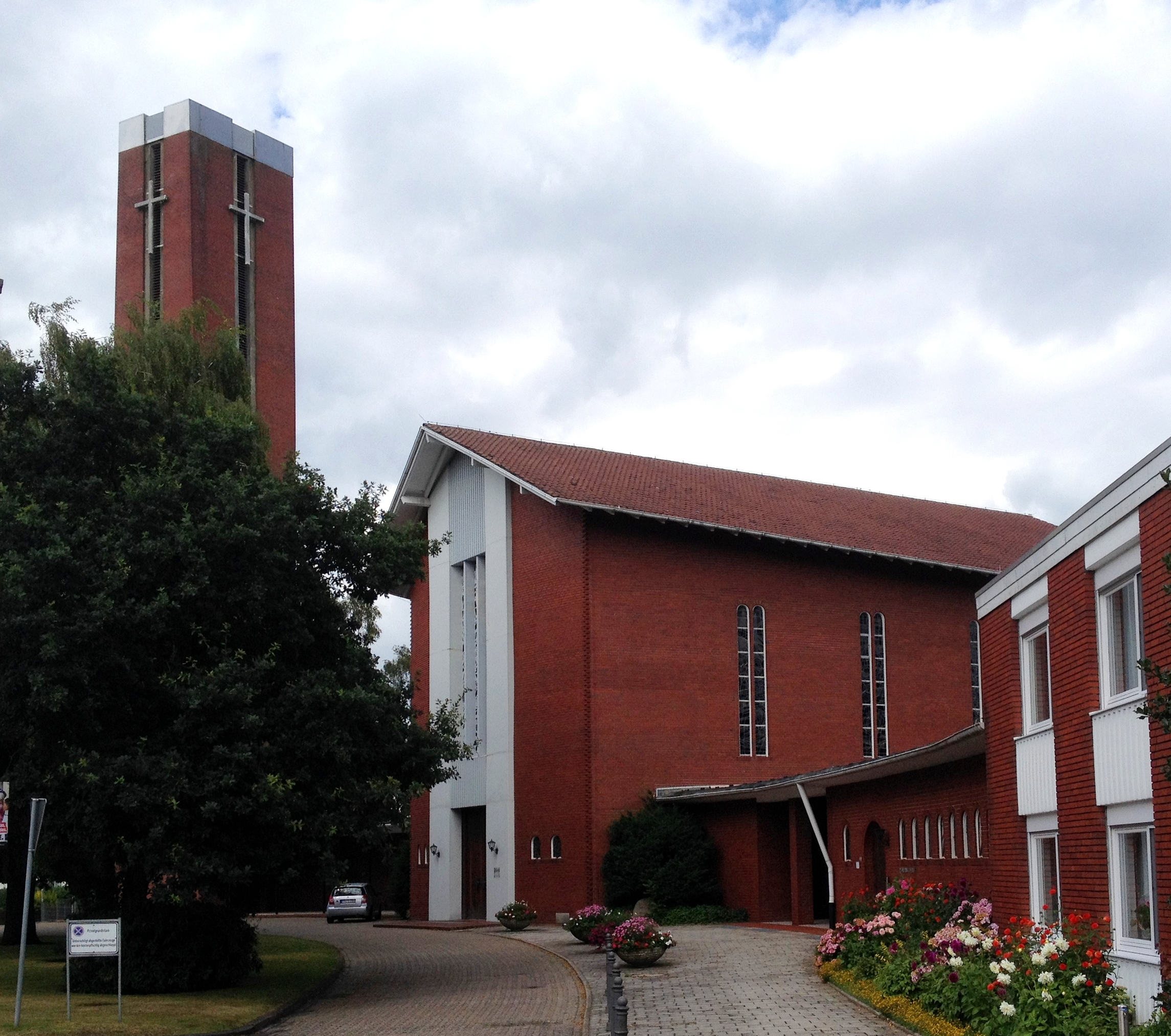 Varel, kath. Pfarrkirche St. Bonifatius